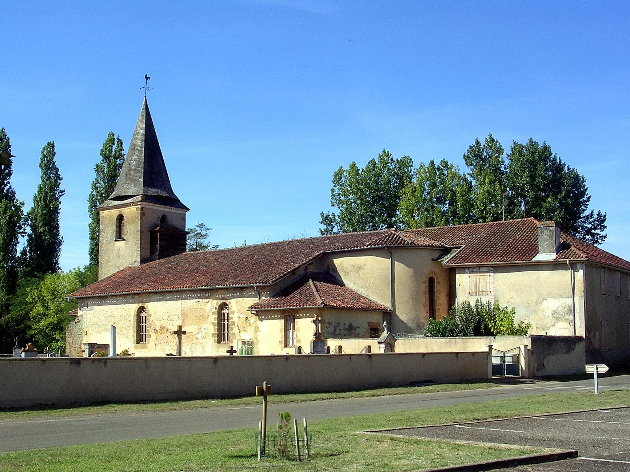 Eglise de Pujo-le-Plan, dans le dépertement français des Landes